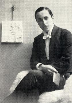 Rudolf Piskáček (1884 - 1940), Český hudební skladatel.